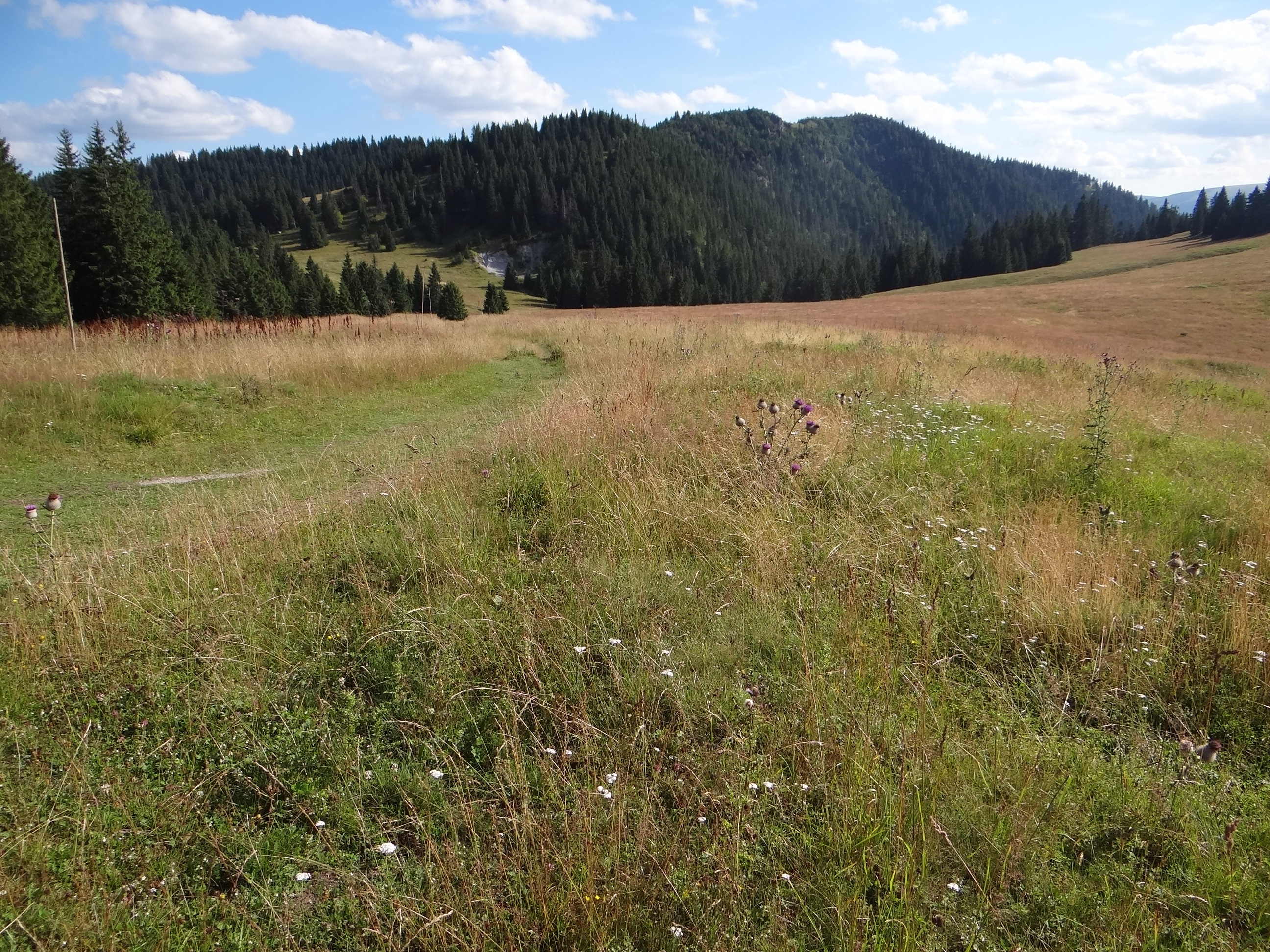 Skalná Alpa i najwyższa część Blatnej doliny